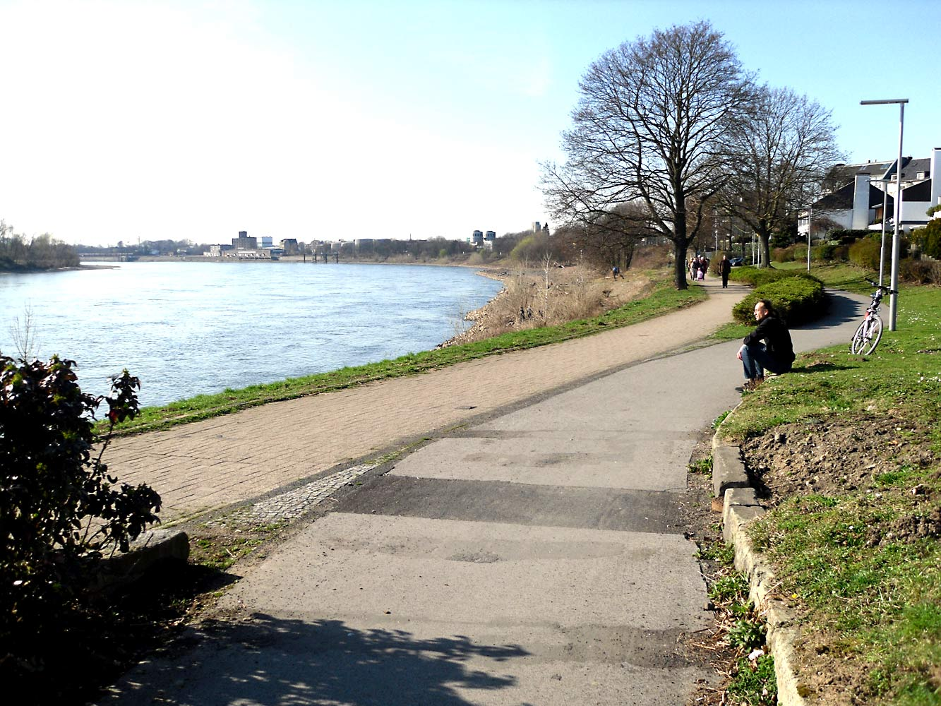 Rhein-Radweg in Düsseldorf-Benrath